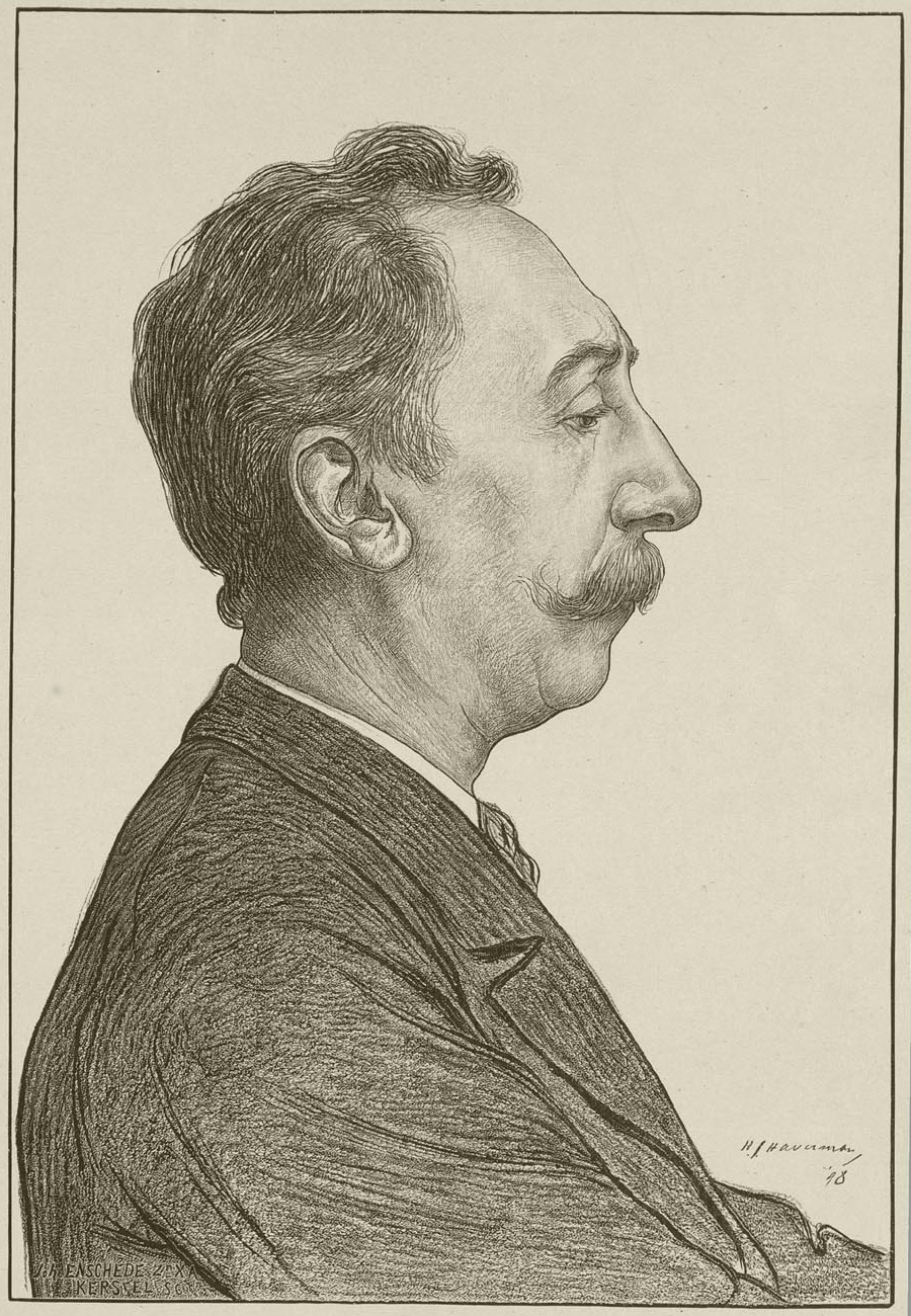 Bernard Zweers (1854-1924); Nederlands componist en dirigent